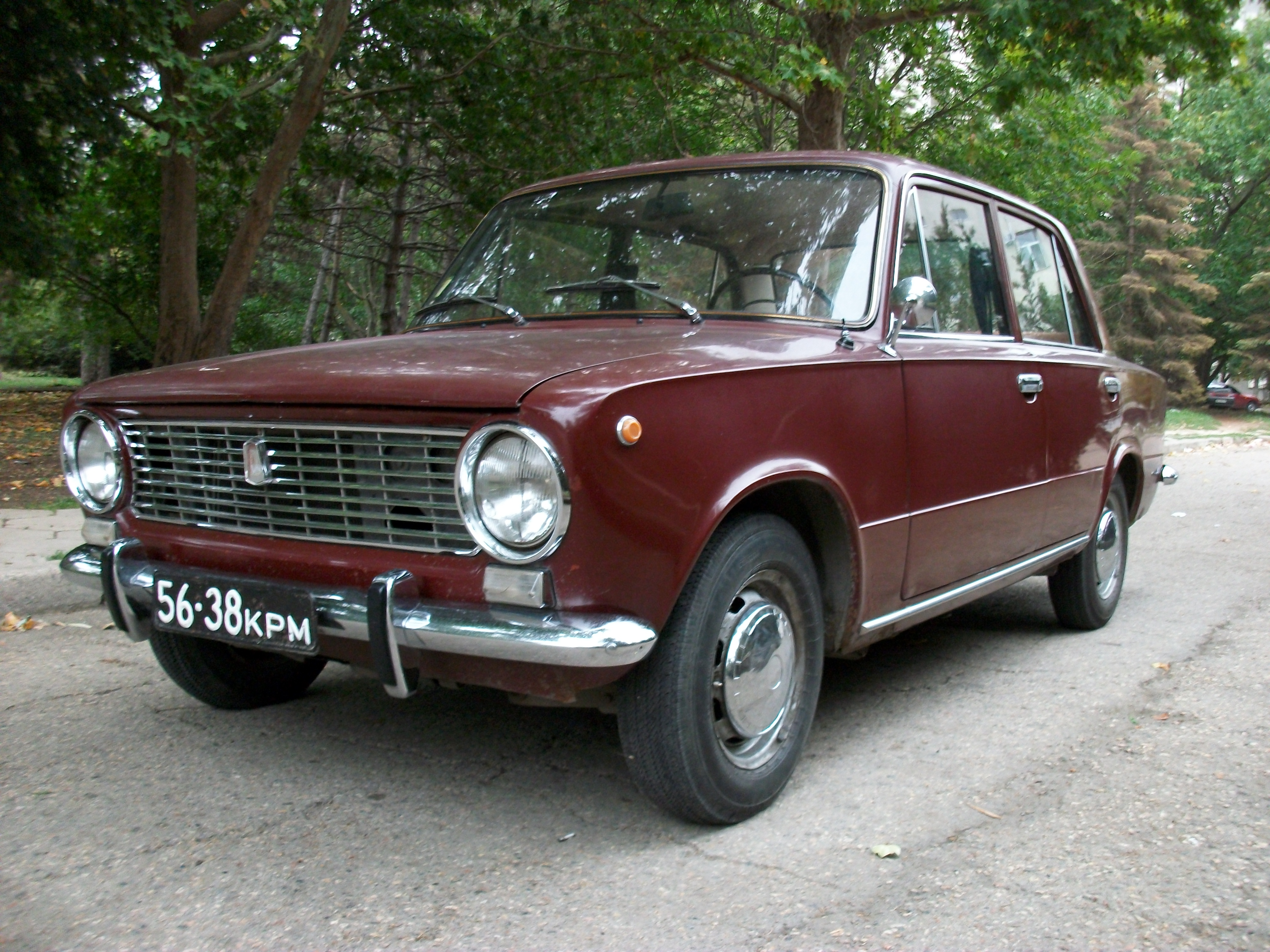 ВАЗ-2101 (1973 г. выпуска) в оригинальном состоянии. Крым, 2010 год.